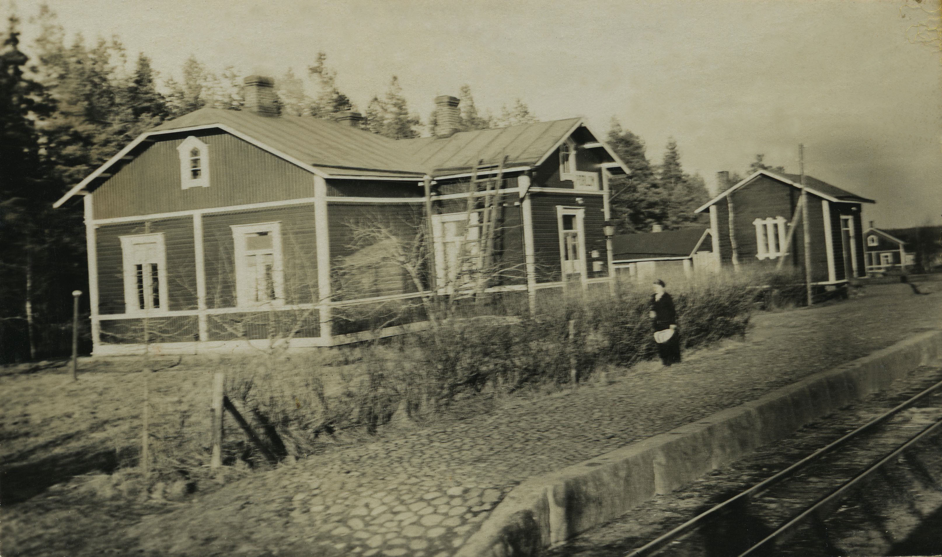 Nainen odottamassa junaa